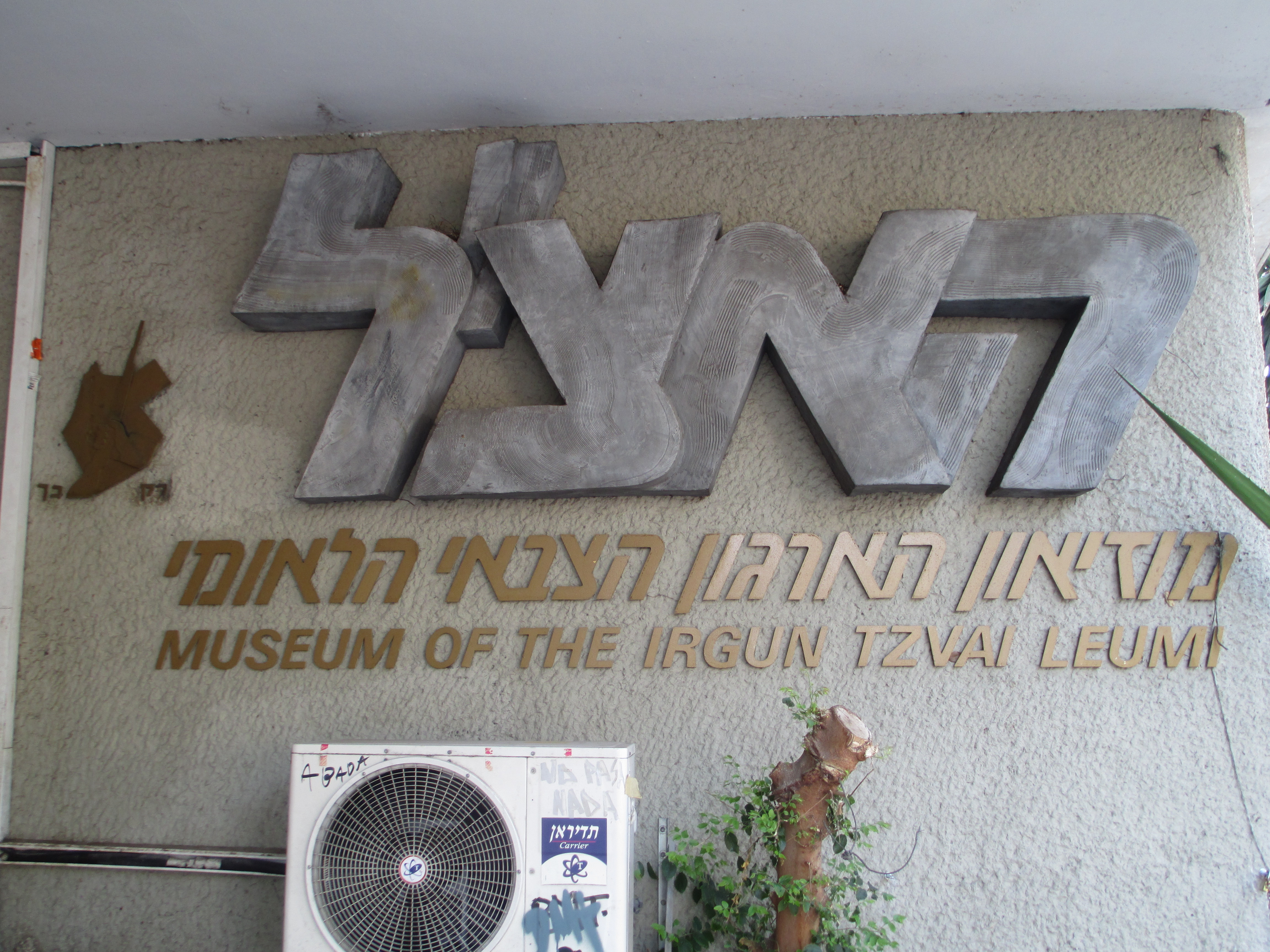 הכניסה למוזיאון האצ"ל ברח' המלך ג'ורג' בתל אביב